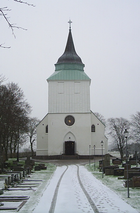 Tegneby kyrka i Tegneby församling, Orusts kommun. Fotograf:Tubaist